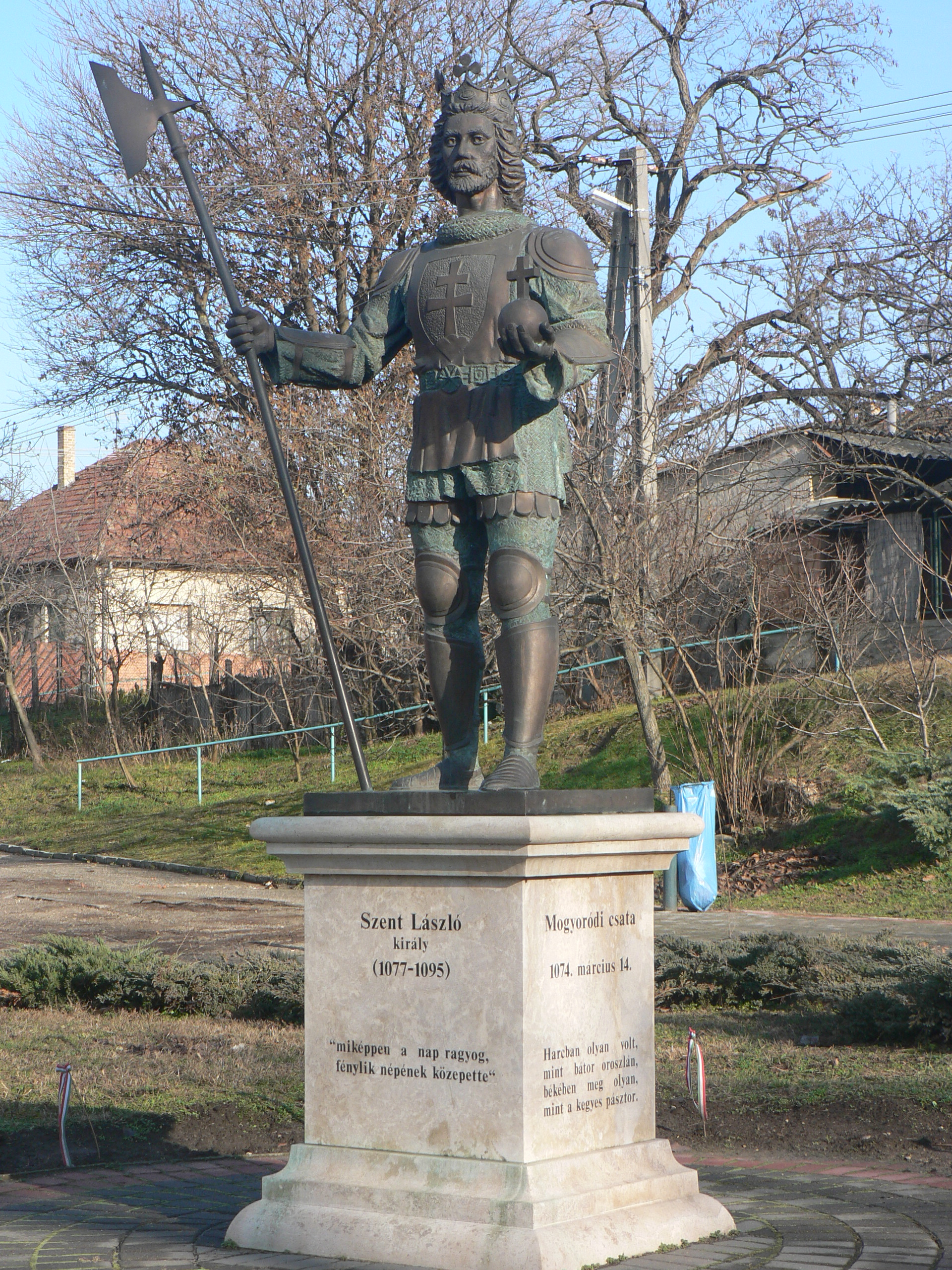 Szent László szobra (2001, Józsa Lajos) a mogyoródi csata emlékére ( Pest megye, Mogyoród, Petőfi Sándor utca és Gödöllői út sarokpark)